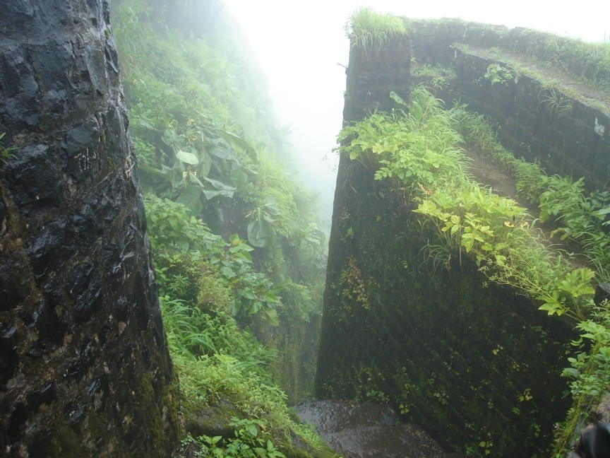 Tikona fort ramparts, Maharashtra, India